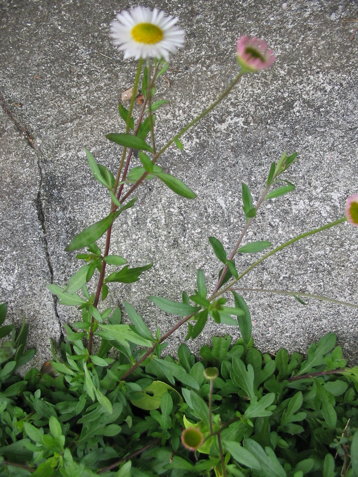 Karwinskis Berufskraut (Erigeron karvinskianus) - Habitus